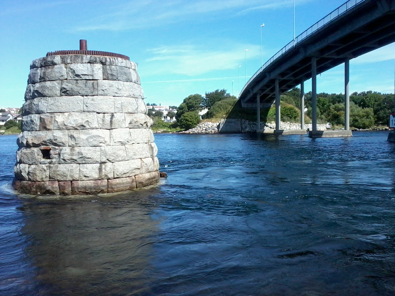 Rester av gamle Hafrsfjord bru